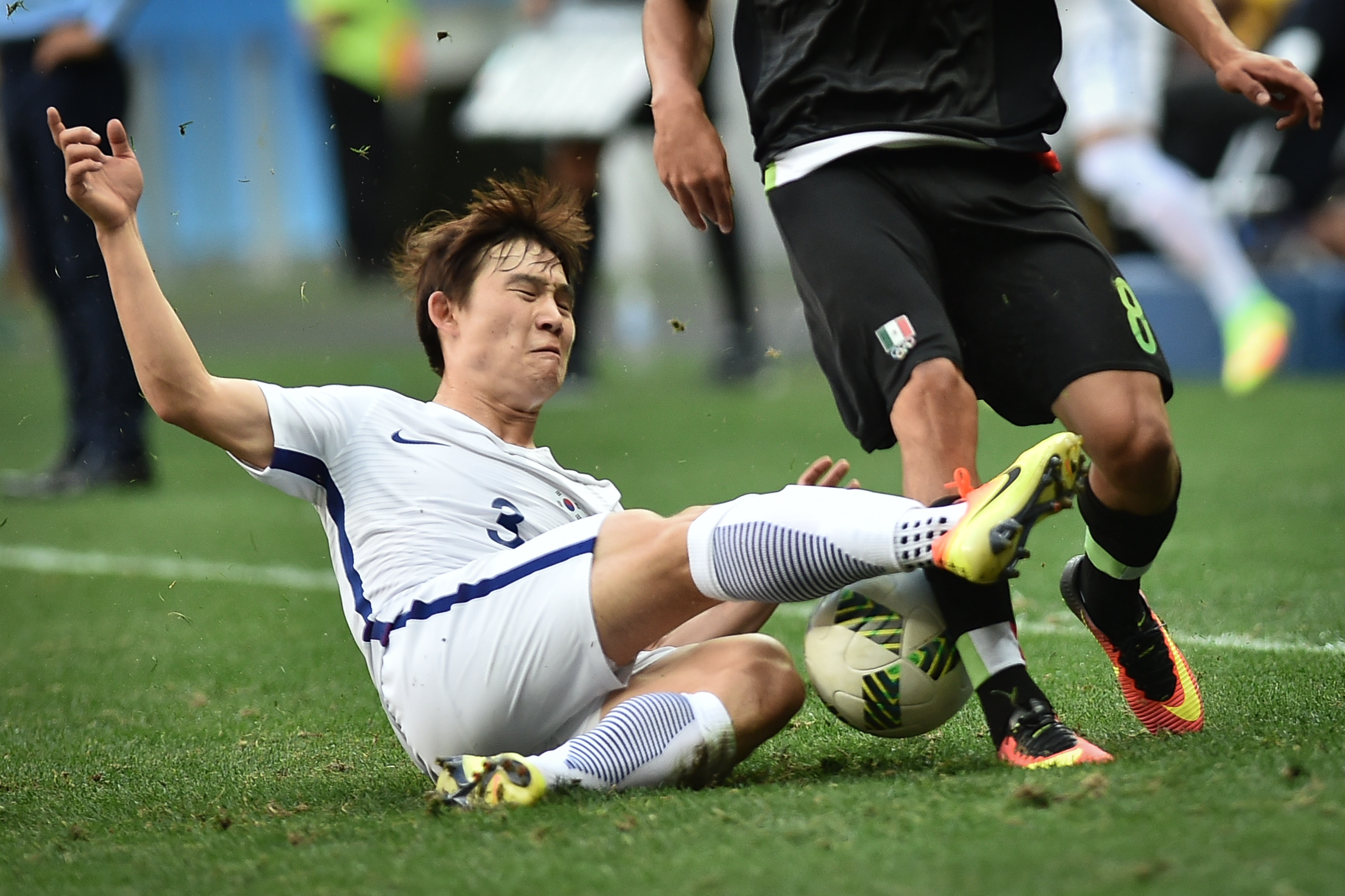 Estádio Nacional de Brasília Mané Garrincha, Brasília, DF, Brasil, 10/8/2016 Foto: Andre Borges/Agência Brasília. O time da Coréia do Sul classificou-se para a próxima fase do torneio de futebol masculino da Olimpíada com uma vitória por 1 a 0 contra o México. Kwon Chang-hoon marcou o gol da vitória sul-coreana aos 32 minutos do segundo tempo.